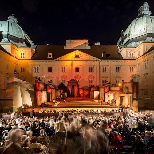 Kaiserhof